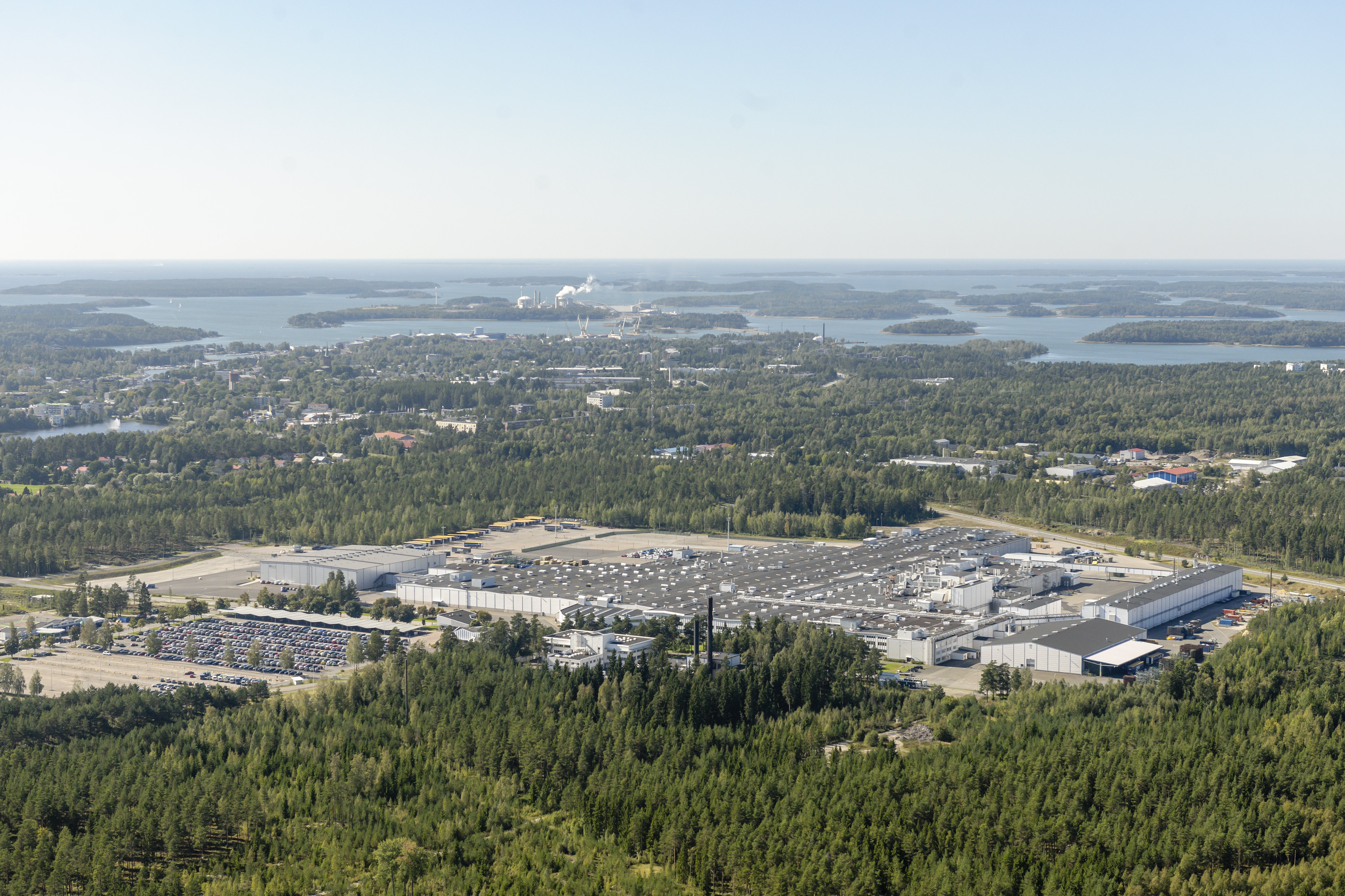 Aerial view